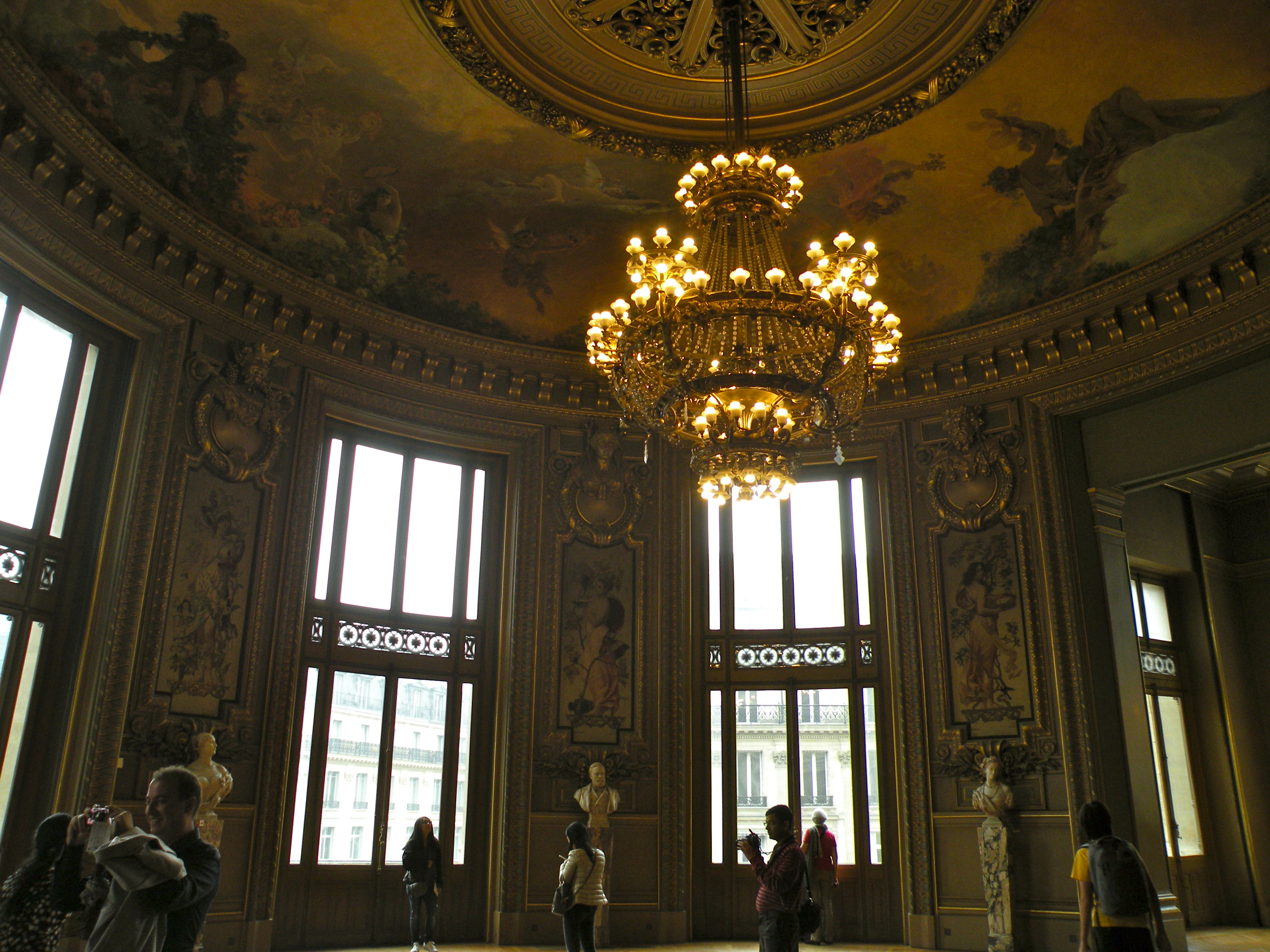 interieur du Salon du glacier de l'Opéra Garnier